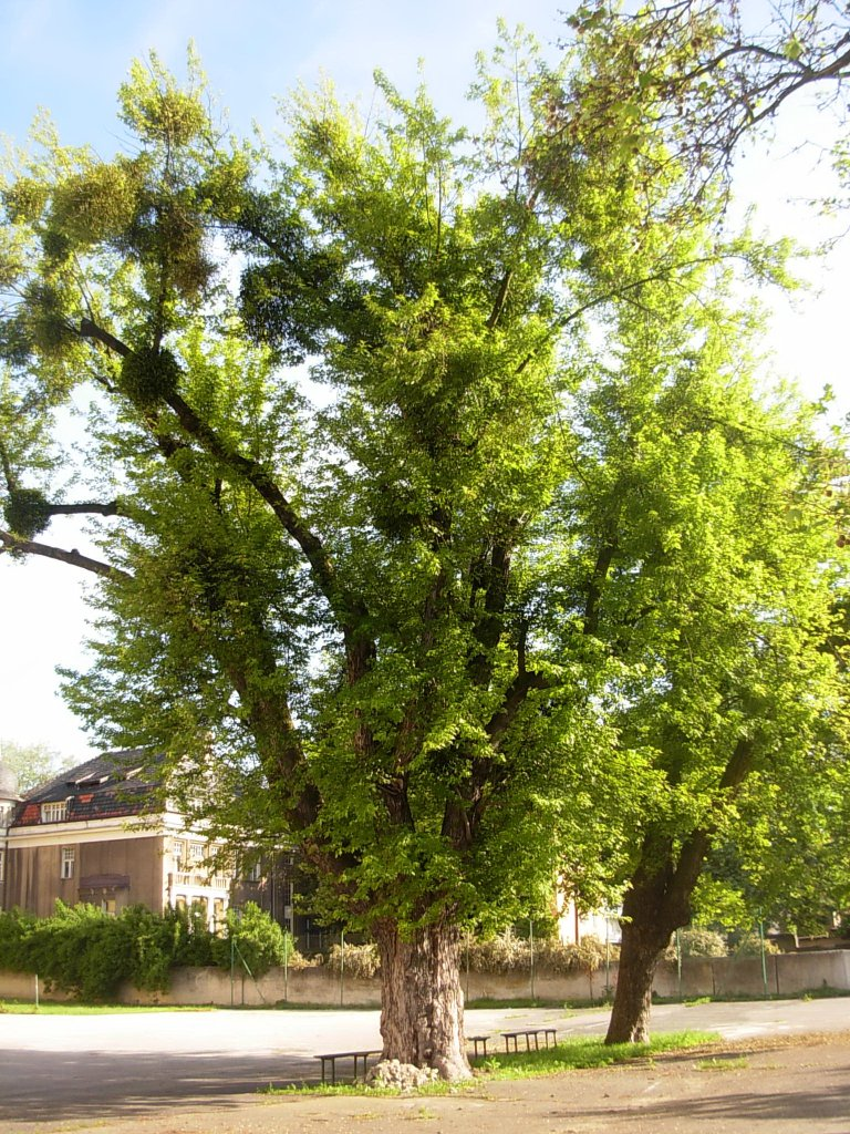 Klon srebrzysty pomnik przyrody na dziedzińcu Copernicanum w Bydgoszczy